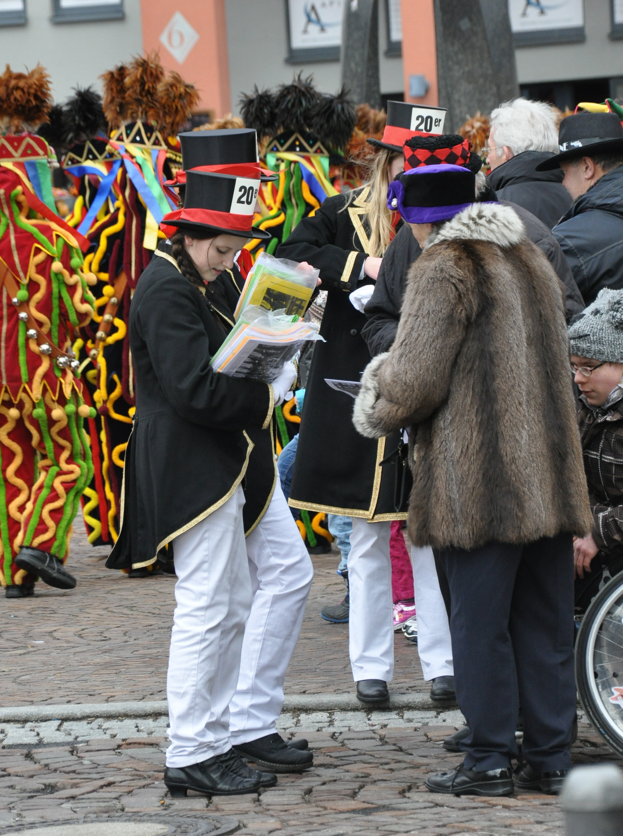 Schömberg (Zollernalbkreis), Narrentanz „Da Bolanes“ (Polonaise) der Narrenzunft Schömberg am Fasnetsmontag morgen (ab 10.31 Uhr), die 20er verkaufen ihr Narrenblättle